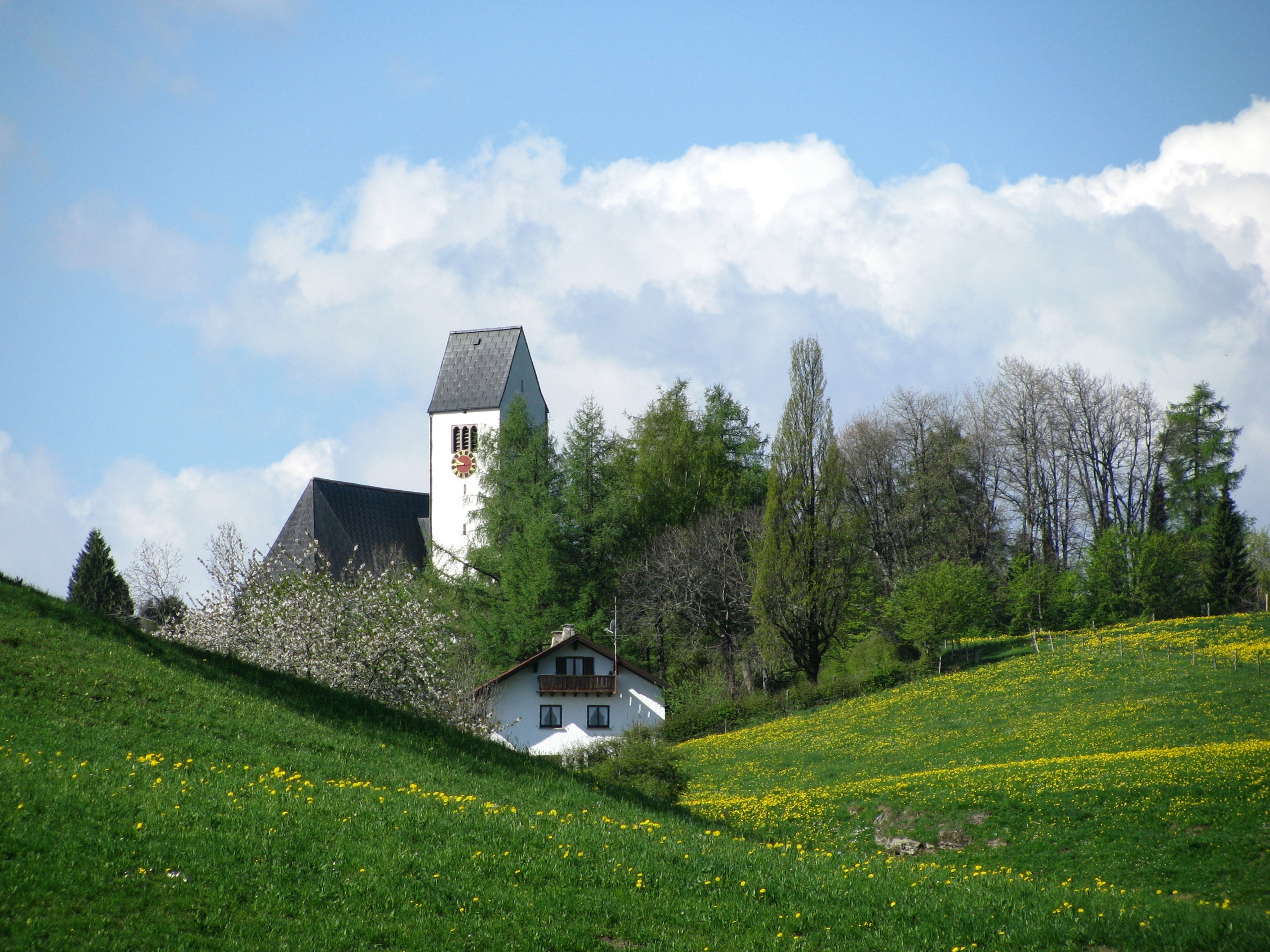 Pfarrkirche St. Michael aus Nordosten